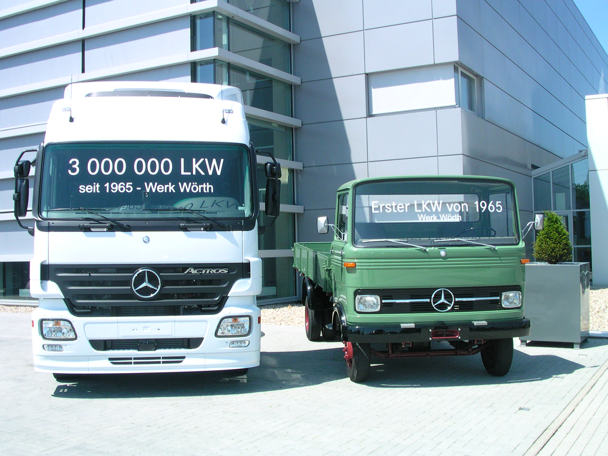 großes Oldtimertreffen im Mercedes-Werk in Wörth am Rhein 2006